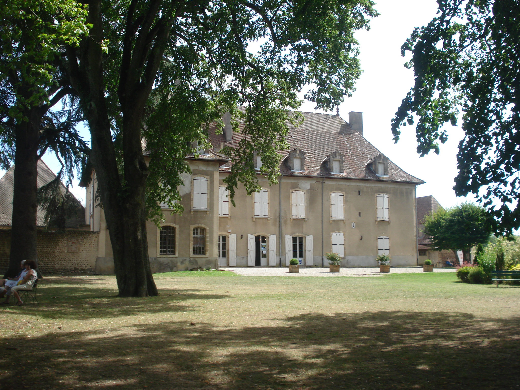 château communal du XVIIe siècle situé à Hauterives dans la Drôme